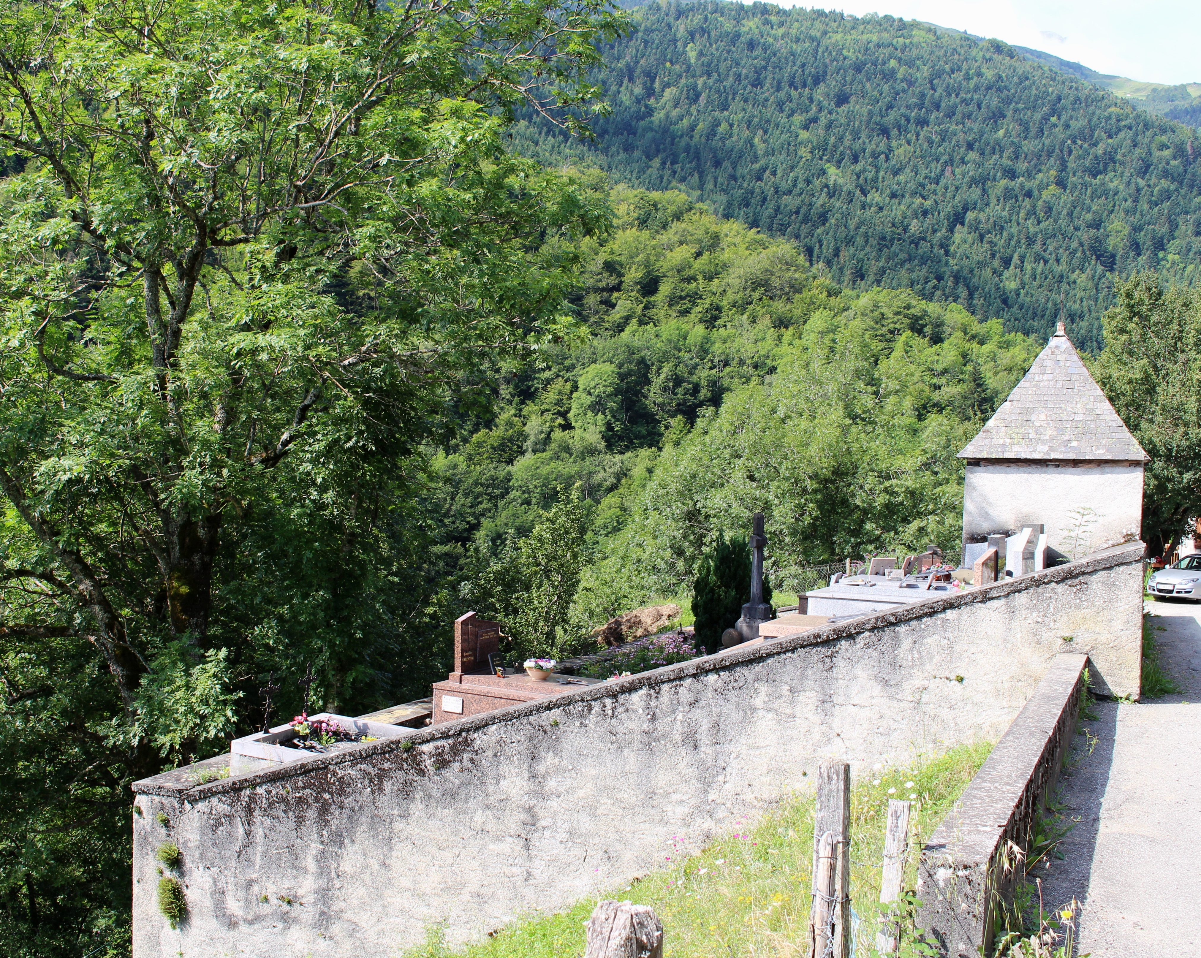 Cimetière de Barrancoueu (Hautes-Pyrénées)